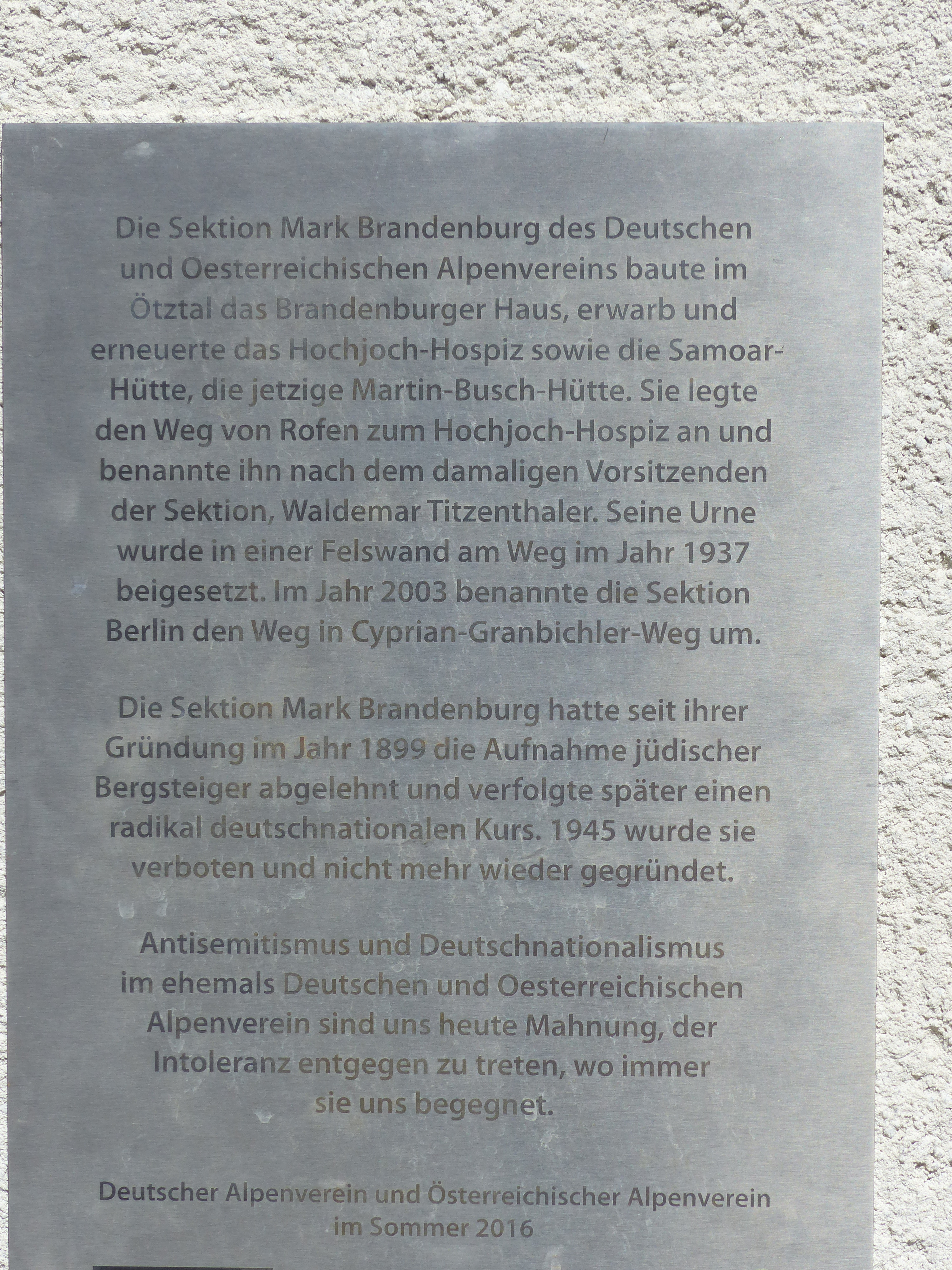 Gedenktafel am Hochjochhoszpiz: Information über die Sektion Sektion Mark-Brandenburg des DuOEAV